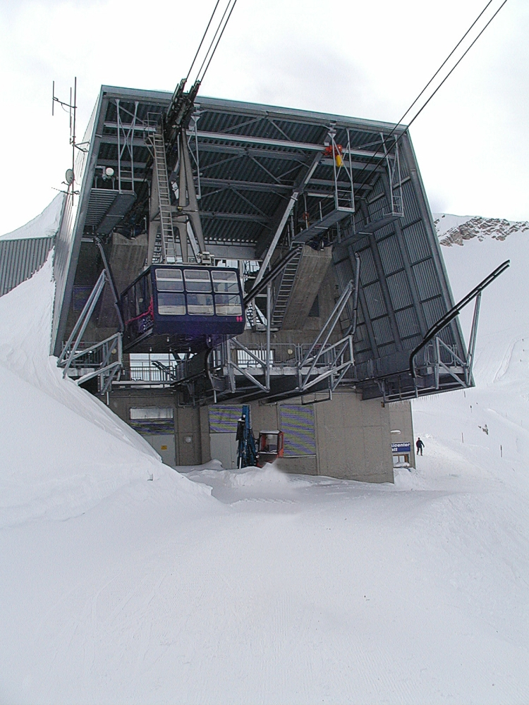 Bilder von der Zugspitze: lower station of Zugspitze-Gletscherbahn going to the summit